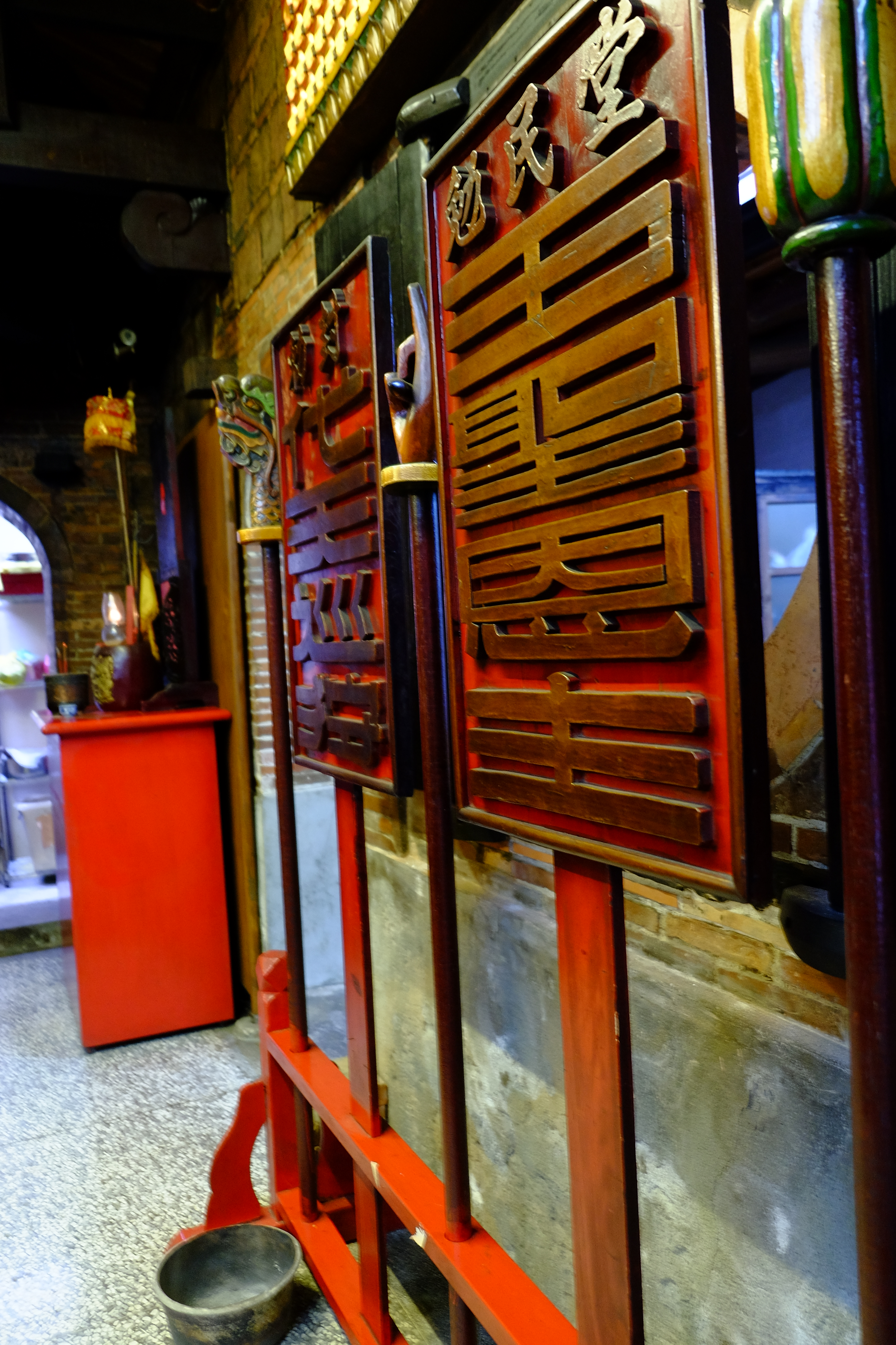 2016年羅東鎮勉民堂